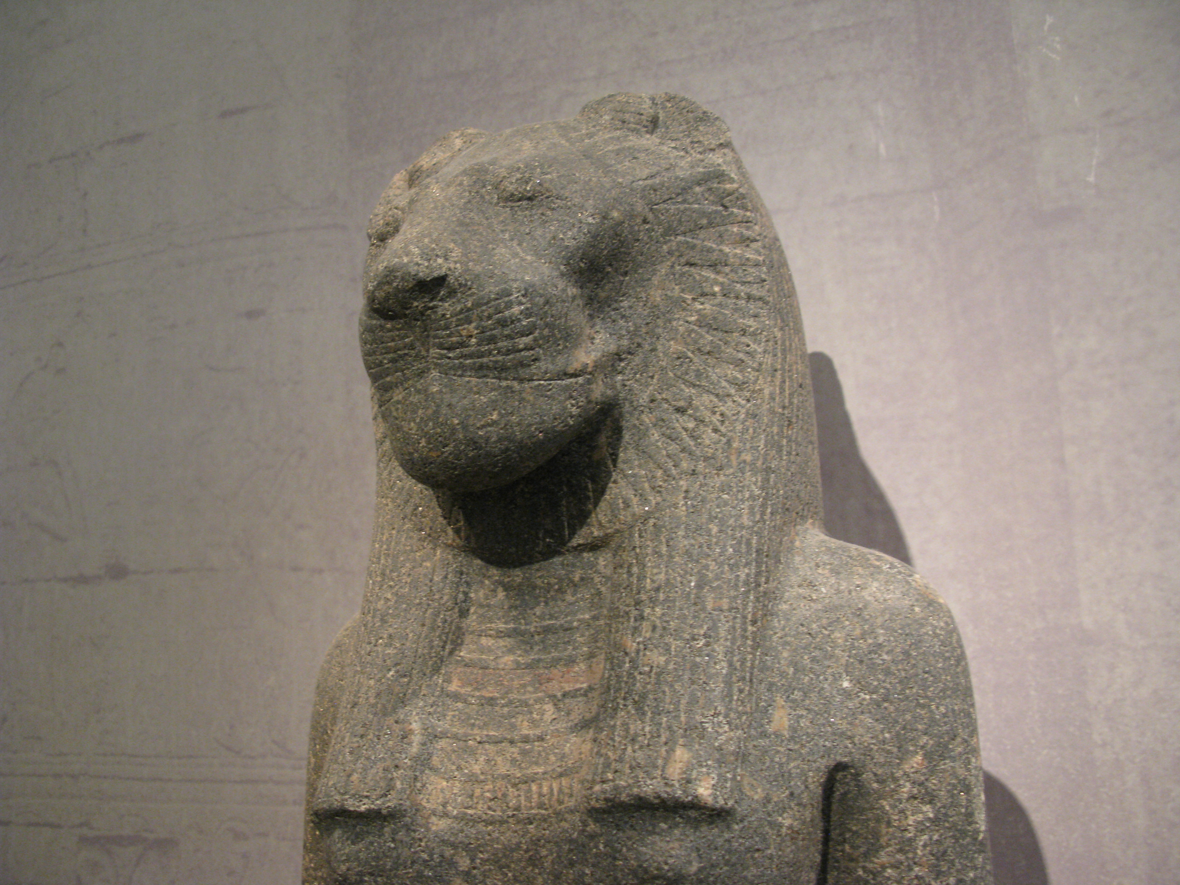 Egyptian Artifacts. National Archaeological Museum, Athens, Greece --- "Τμήμα κολοσσιαίου αγάλματος της θεάς Σεκχμέτ. Πρόκειται για ένα από τα εφτακόσια αγάλματα που διακοσμούσαν τον ναό της Ιεάς Μουτ στο Κορνάκ ή τον νεκρικό ναό του Αμένωφι Γ΄στις Δυτικές Θήβες. Γρανοδιορίτης. Νέο Βασίλειο, 18η Δυναστεία, 1391-1353 π.Χ." Αιγυπτιακή συλλογή. Εθνικό Αρχαιολογικό Μουσείο. Αθήνα.